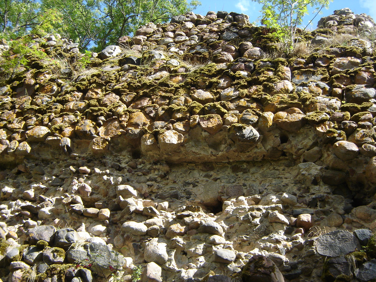 Helme ordulinnus. Linnuse müüridel on säilinud vahelae talade tugimüür.